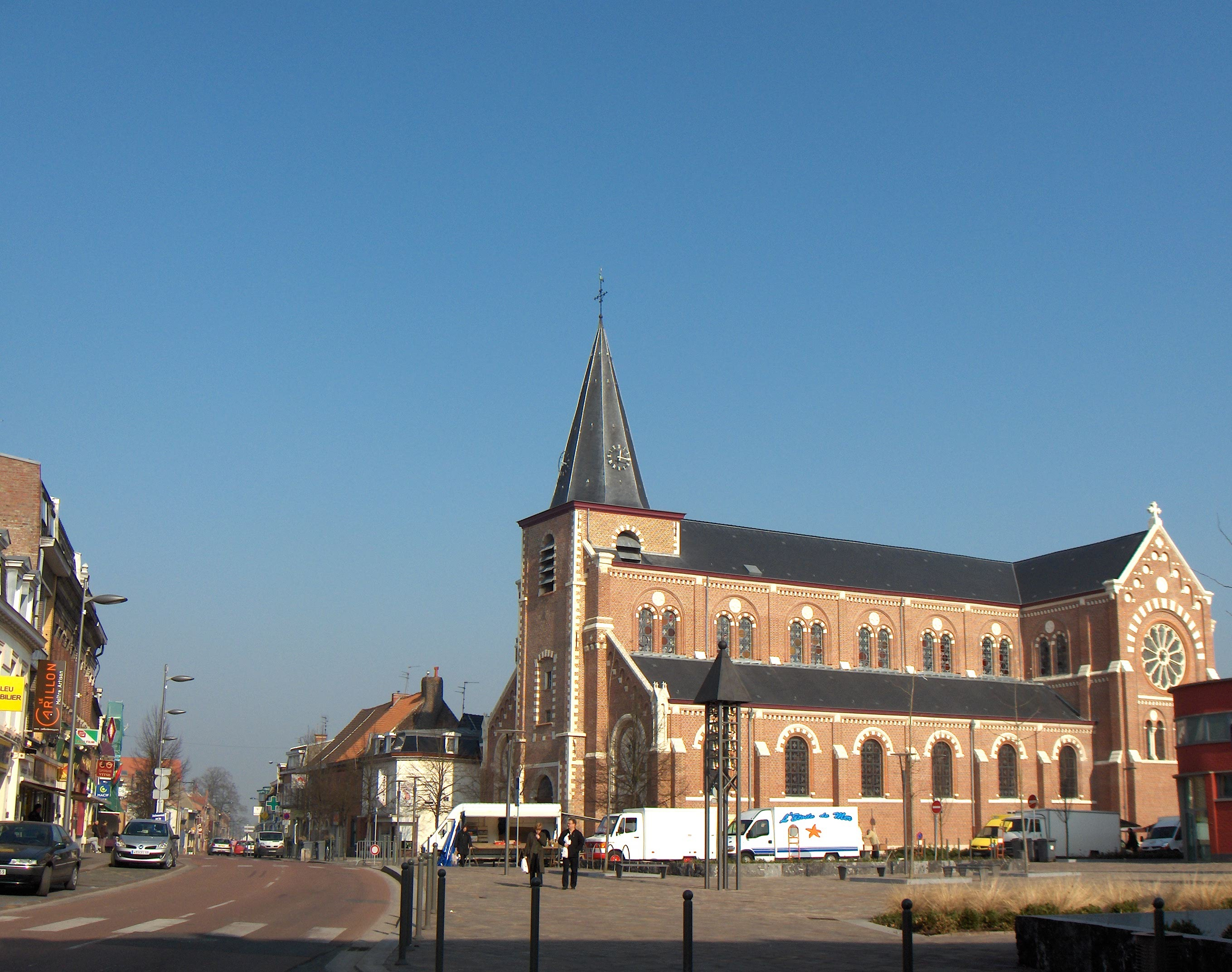 Roncq (France, dépt. Nord), église Saint-Piat (1868-1874 par Jean-Baptiste Maillard, tour du XVIIIe siècle,)